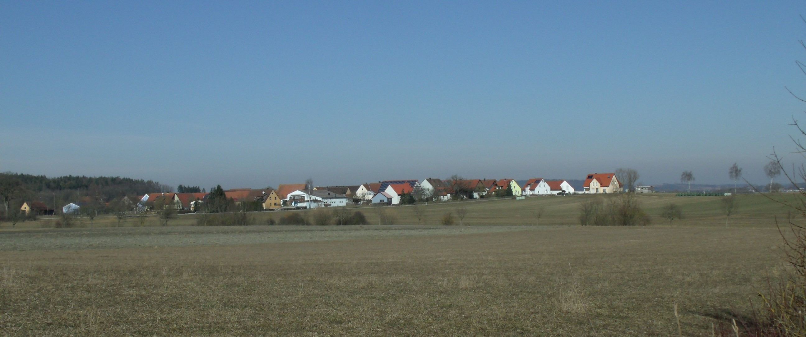 Stadel, Ortsteil der Stadt Herrieden im mittelfränkischen Landkreis Ansbach